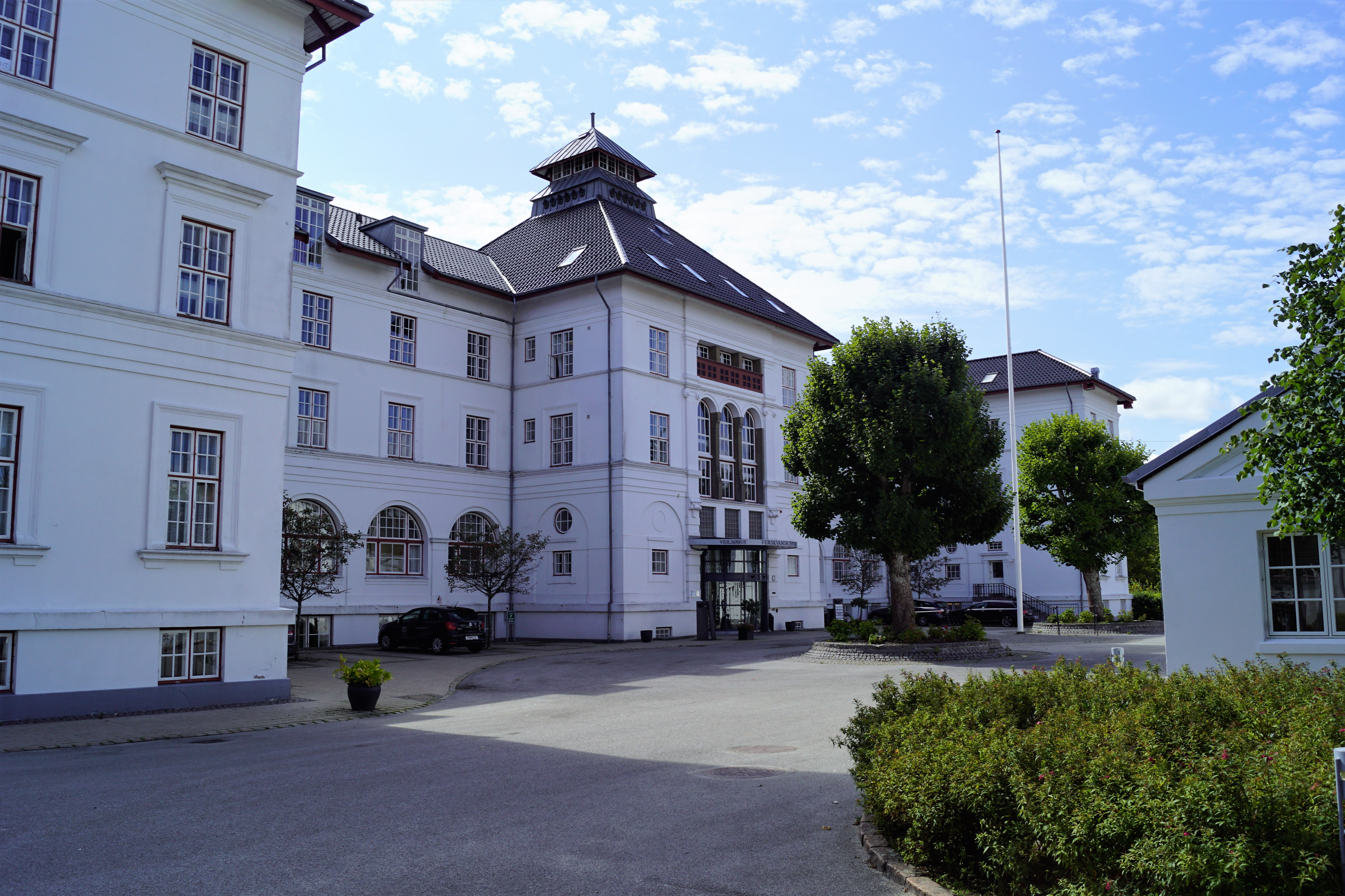 Silkeborg Sanatorium Vejlsøhus, nu Ferskvandscenteret